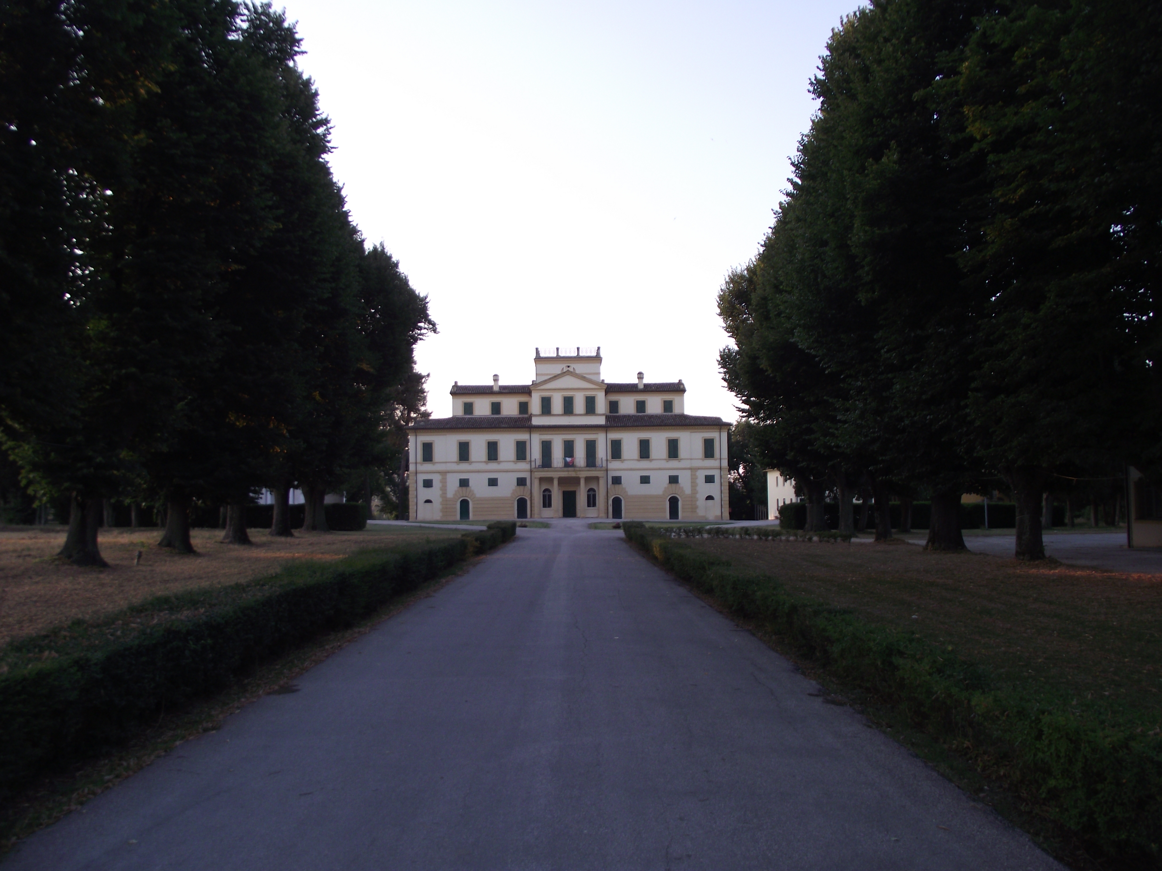 Pianello Vallesina, Villa Salvati, XVIII-XIX secolo